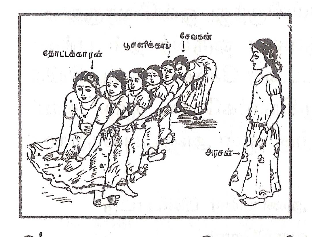 பூசனிக்காய் விளையாட்டில் பூசனிக்காயாக உள்ள சிறுமியை இழுத்தல்.மறைகின்ற விளையாட்டுகள் என்னும் எனது நூலிலிருந்து எடுத்துப் பதிவேற்றப்பட்டது.